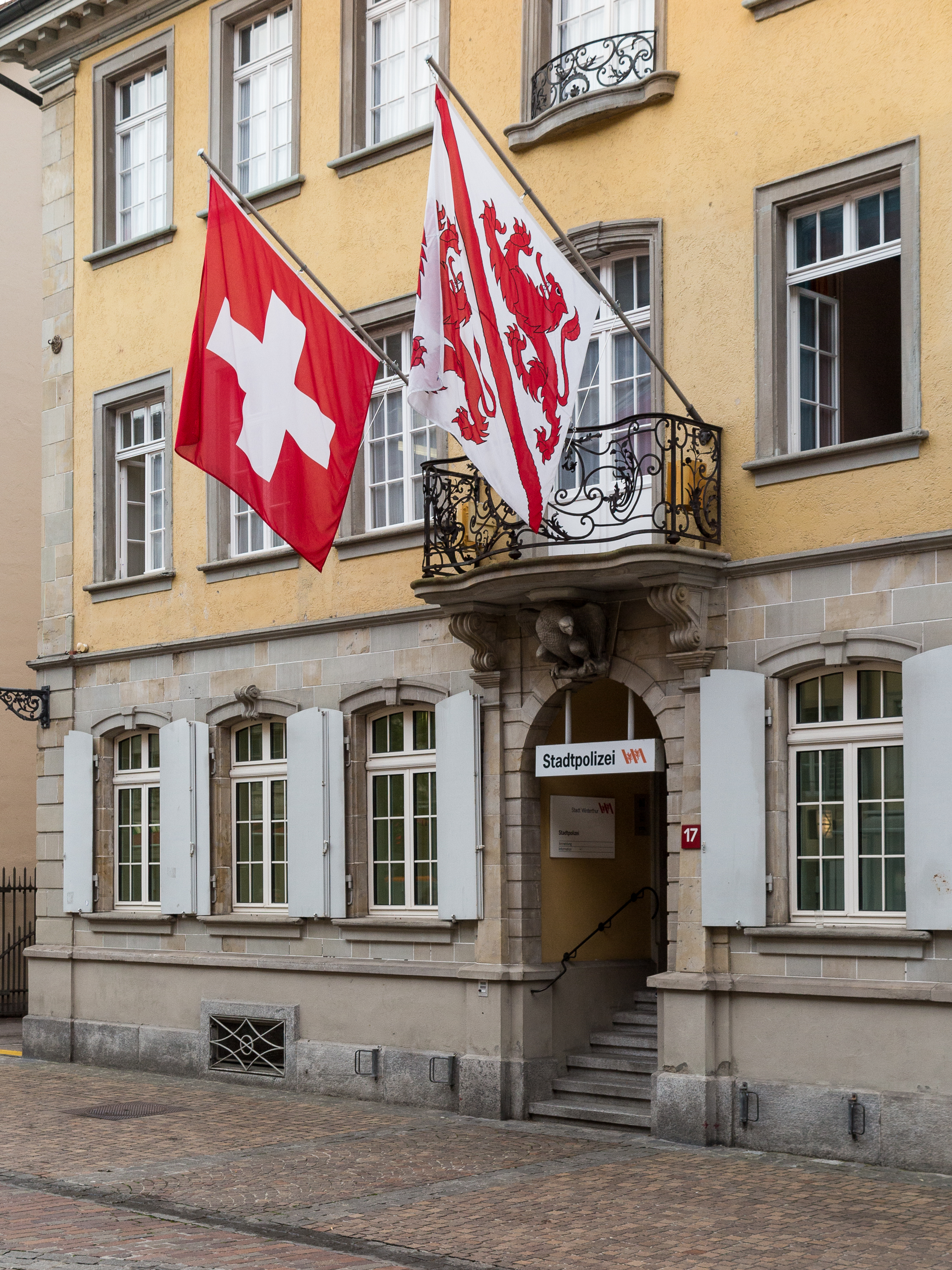 Obertor 17, Sitz der Stadtpolizei Winterthur